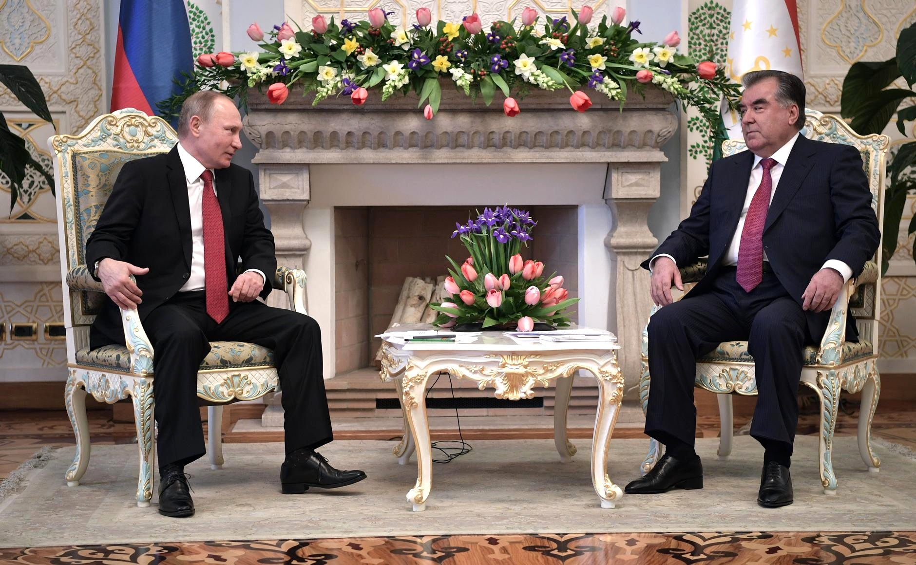 Встреча Президента России Владимира Путина с Президентом Таджикистана Эмомали Рахмоном